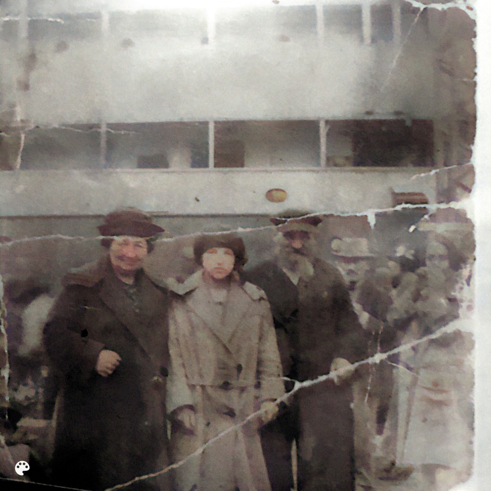 1924 יהודים עולים לארץ ישראל מגדנסק, פולין, בשנת